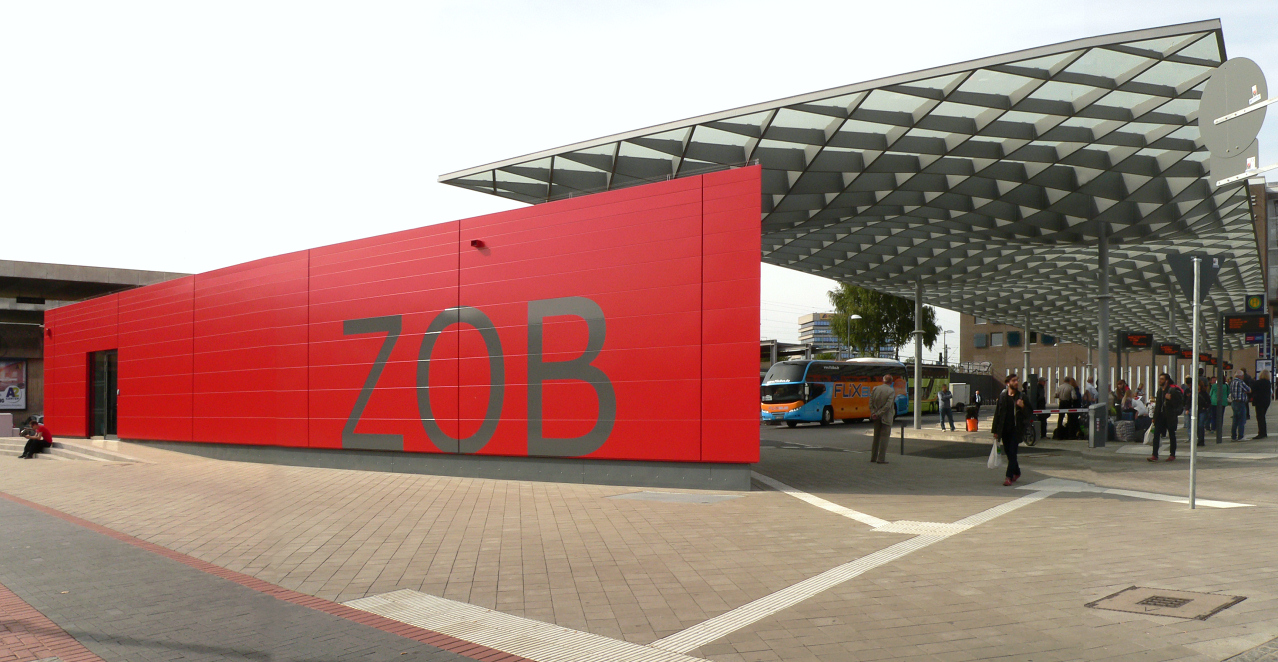 Zentraler Omnibusbahnhof Hannover, Neubau ZOB Hannover